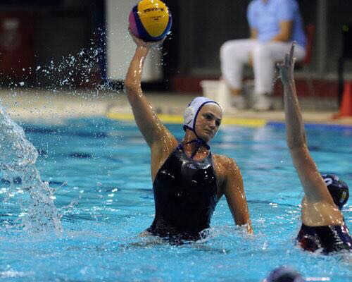 Конух Софья Евгеньевна